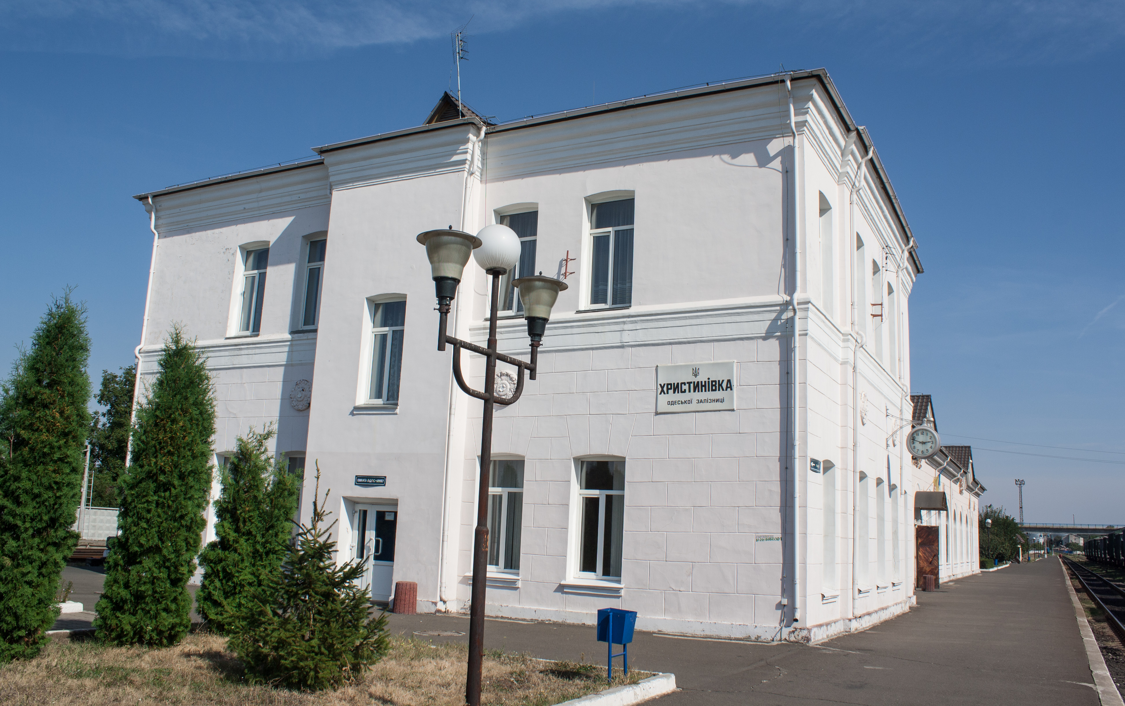 Залізничний вокзал (мур.), Христинівка, вул. Станційна, 19